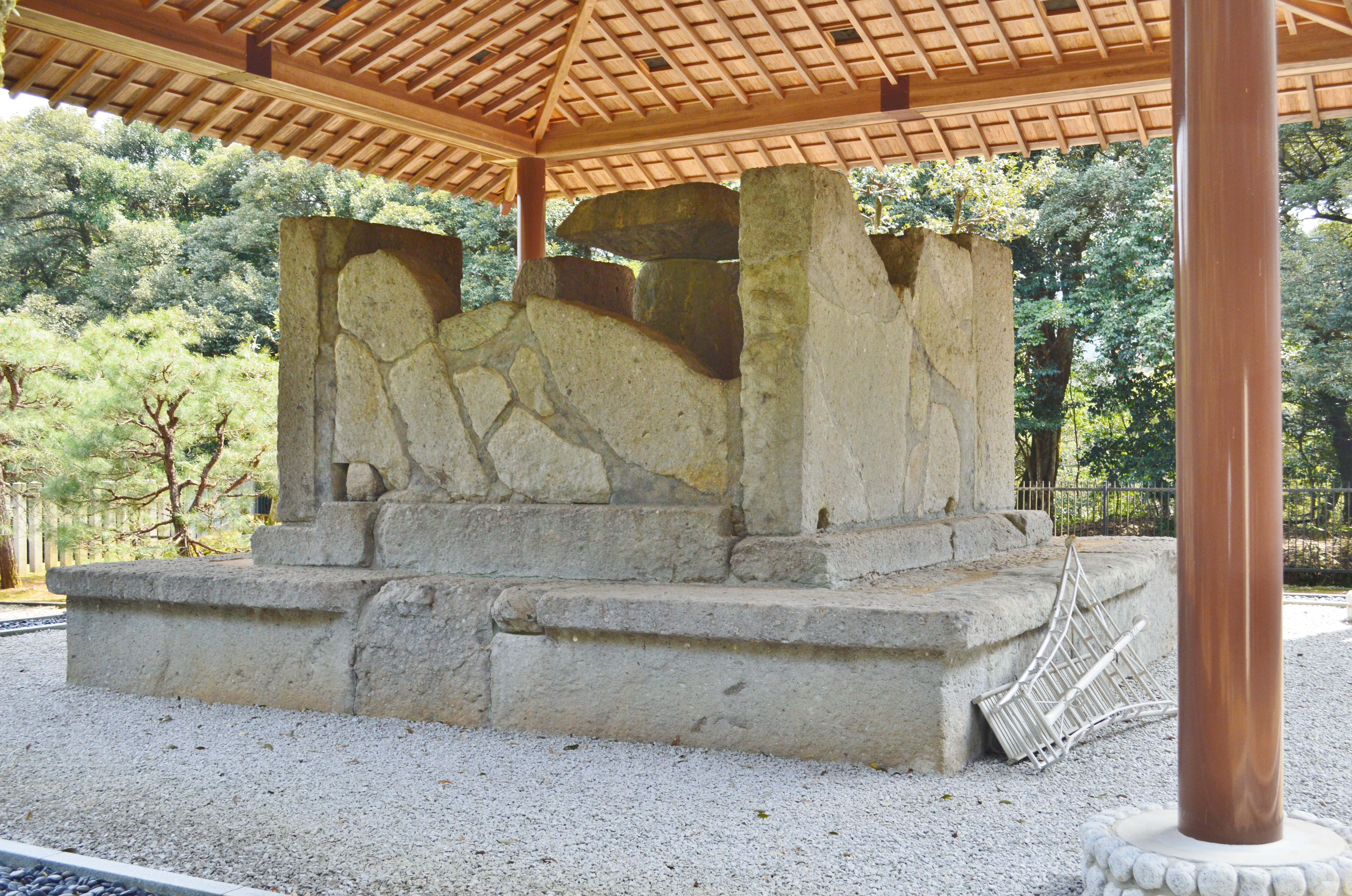 岡益の石堂 背面 Nikon D3200